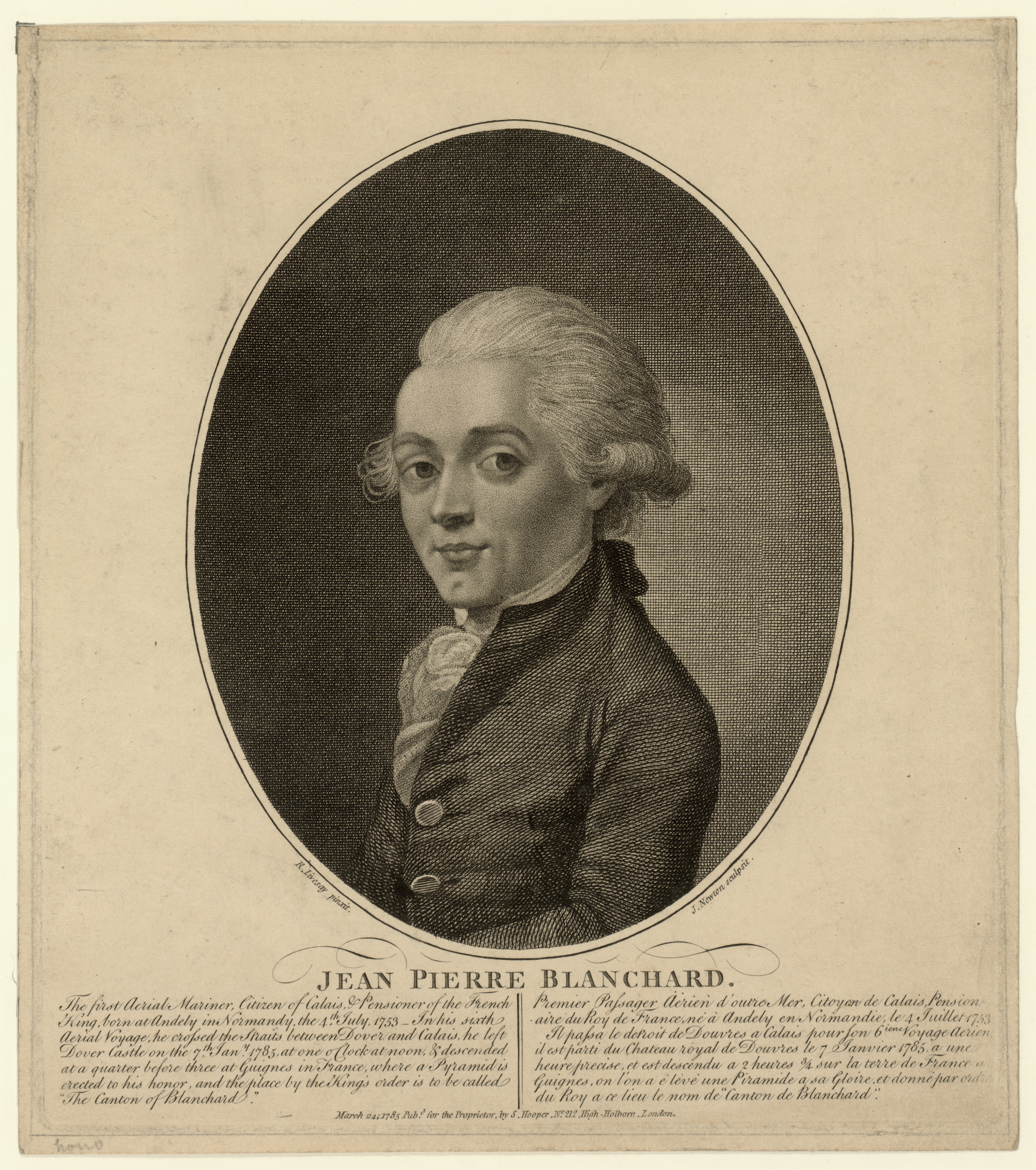 Jean-Pierre Blanchard (* 4. Juli 1753 in Les Andelys; † 7. März 1809 bei Paris) war ein französischer Ballonfahrer. Jean Pierre Blanchard (7 July 1753 ? 7 March 1809), French inventor and balloonist. This image is from the Library of Congress online collection, and is in the public domain. See catalog info below. CALL NUMBER: LOT 13400, no. 10 [P&P] Check for an online group record (may link to related items) REPRODUCTION NUMBER: LC-DIG-ppmsca-02174 (digital file from original print) LC-USZ62-12724 (b&w film copy neg.) No known restrictions on publication. SUMMARY: Half-length portrait of French balloonist, Jean-Pierre Blanchard. Text below elaborates on his career as an aeronaut: "The first aerial mariner, citizen of Calais & pensioner of the French King, born at Andely in Normandy the 4th July, 1753 ..." SUBJECTS: Blanchard, Jean-Pierre, 1753-1809. Balloonists--French--1780-1790. REPOSITORY: Library of Congress Prints and Photographs Division Washington, D.C. 20540 USA DIGITAL ID: (digital file from original print) ppmsca 02174 (b&w film copy neg.) cph 3a15083 CARD #: 2002716387